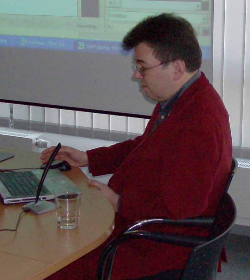 Klaus Bischoff, chess grandmaster